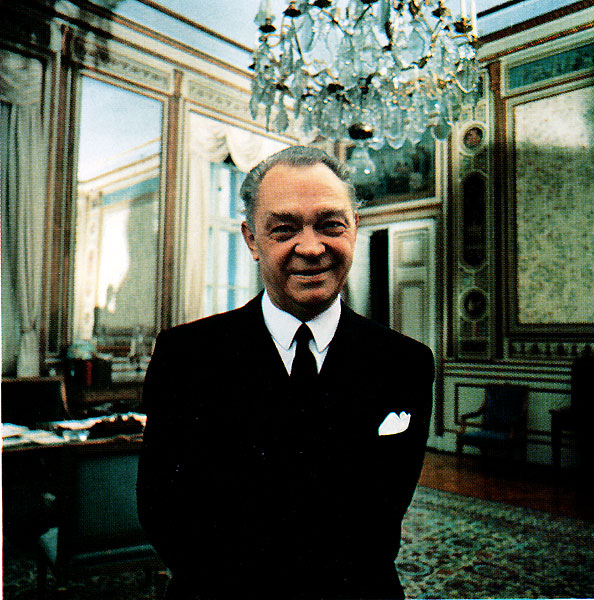 Torsten Nilsson